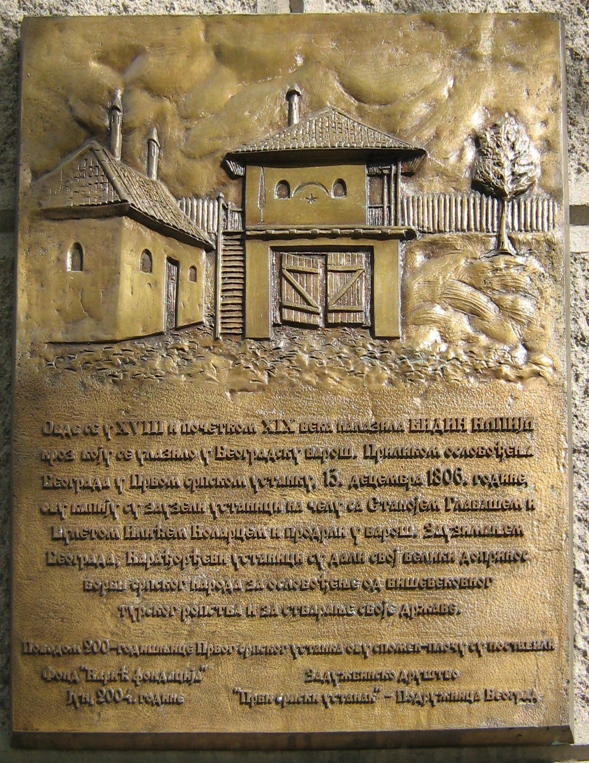 Видин капија - спомен плоча на Првој београдској гимназији.